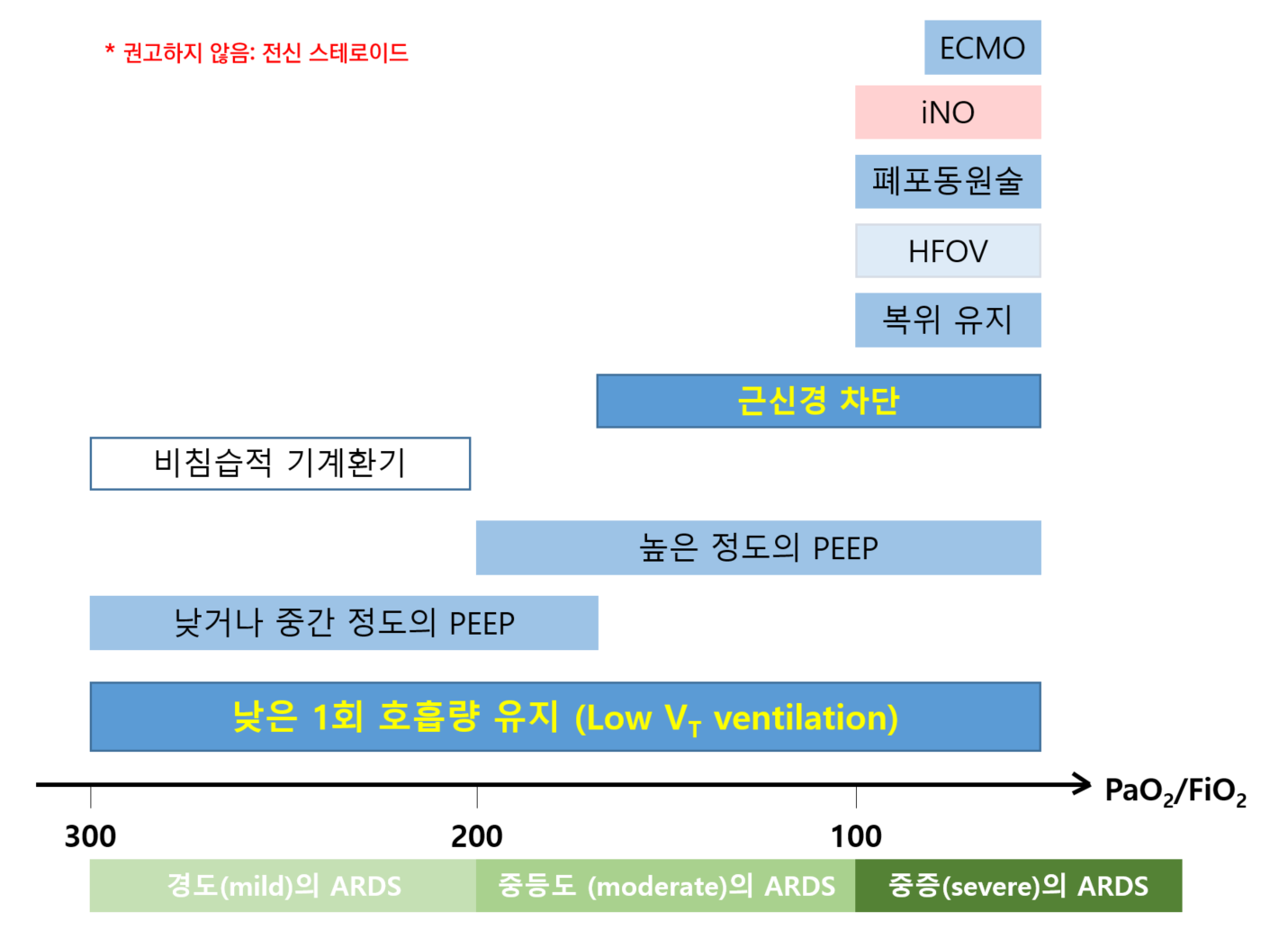 급성호흡기증후군(ARDS)에 관한 치료법. 색이 짙은 파란색일수록 근거 수준 높음. 붉은색의 치료는 권고되지 않음. 흰색은 임상적 근거가 충분하지 않음. ECMO: extracorporeal membrane oxygenation, iNO: inhaled nitric oxide, HPOV: high frequency oscillation ventilation, PEEP: positive end expiratory pressure reference: [1], [2], [3]